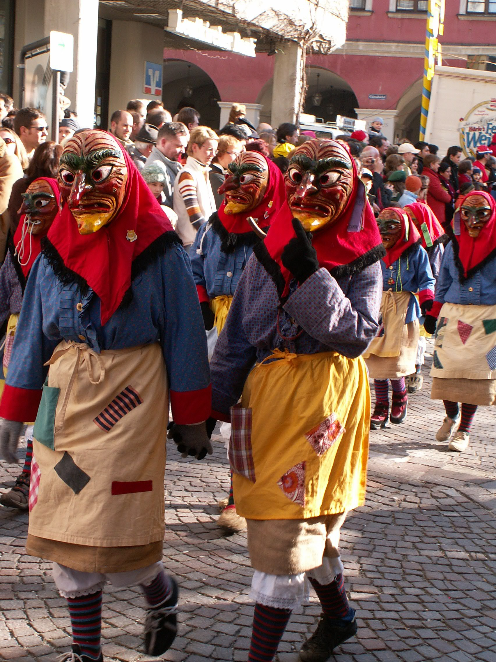 Narrensprung in Leutkirch, Februar 2007